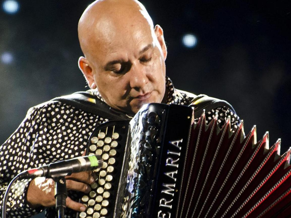 Corrientes, 24 de enero de 2015 - Novena noche del 25 Festival Nacional del Chamamé.Fotos: Romina Santarelli / Ministerio de Cultura de la Nación.